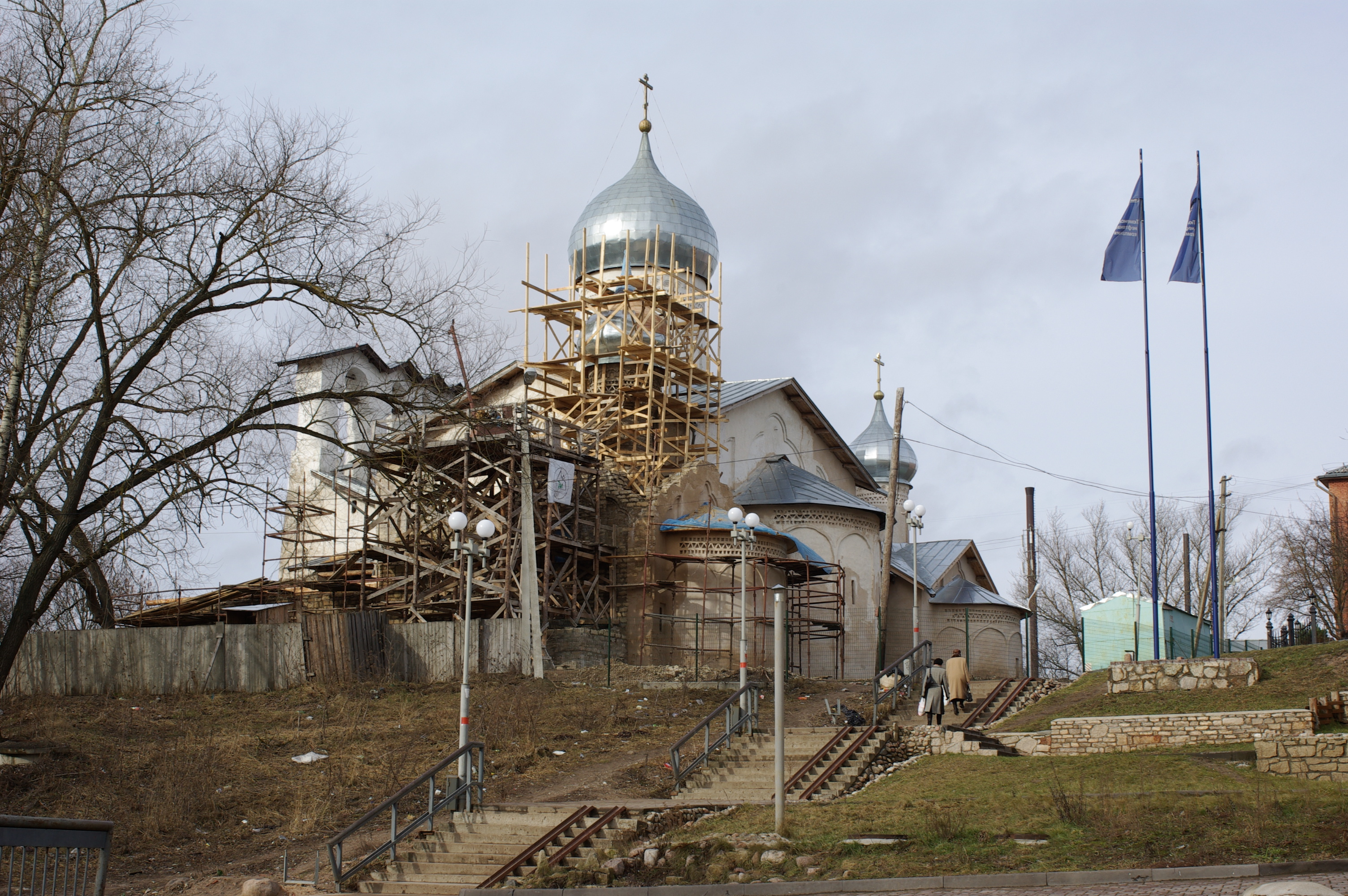 Bogoyavleniya church,Церковь Богоявления с Запсковья